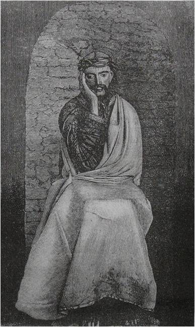 Фотооткрытка начала XX века